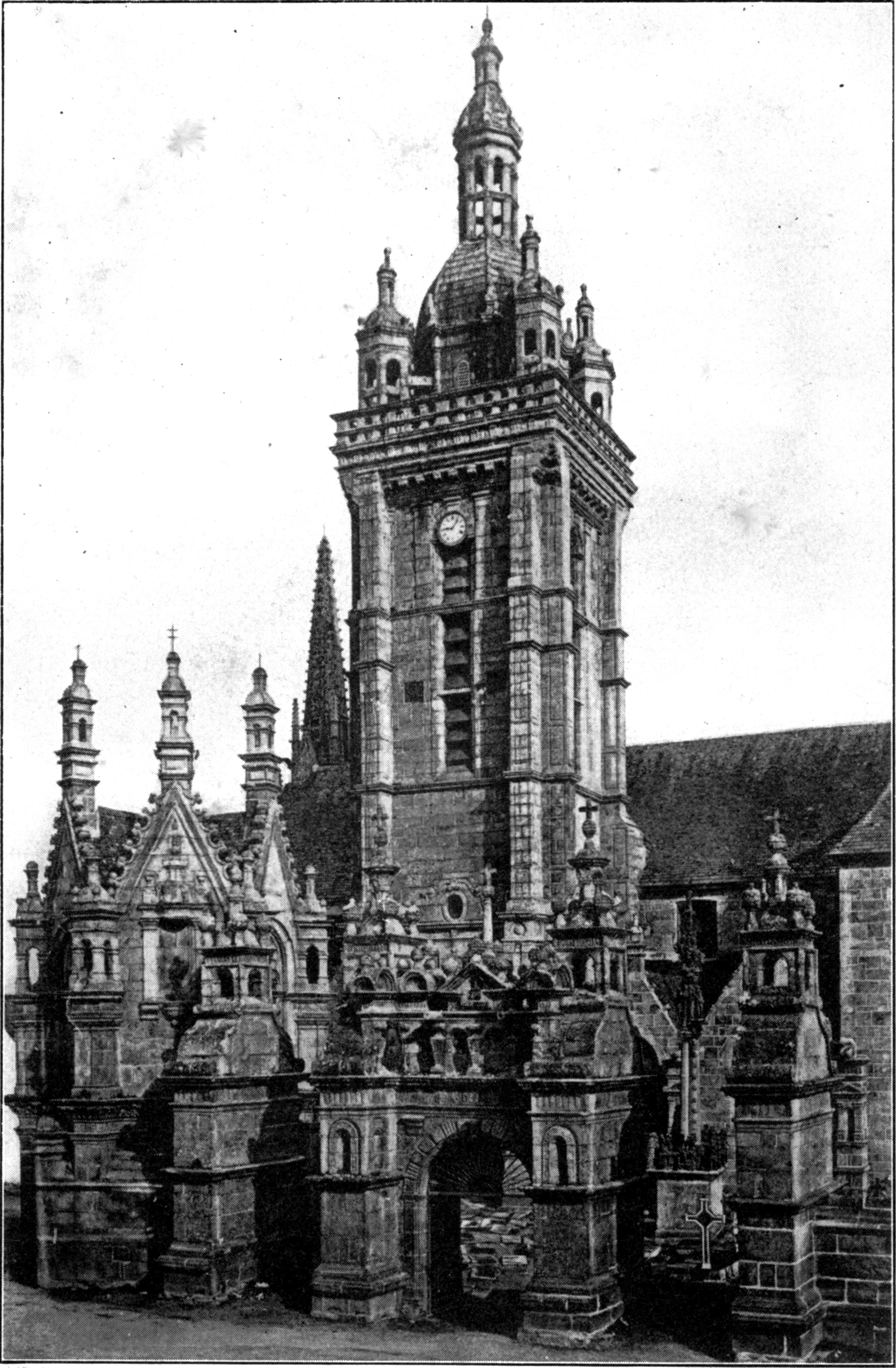 Illustration du livre : Saint-Thégonnec. L’Église et ses annexes de l'Abbé François Quiniou (1870 – 1931) après la page xi